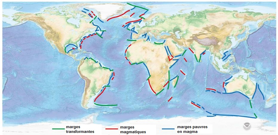 Les différents types de marges passives